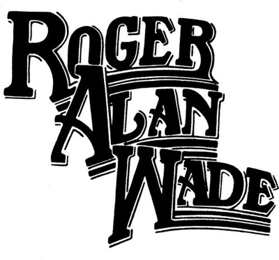 Roger Alan Wade's logo